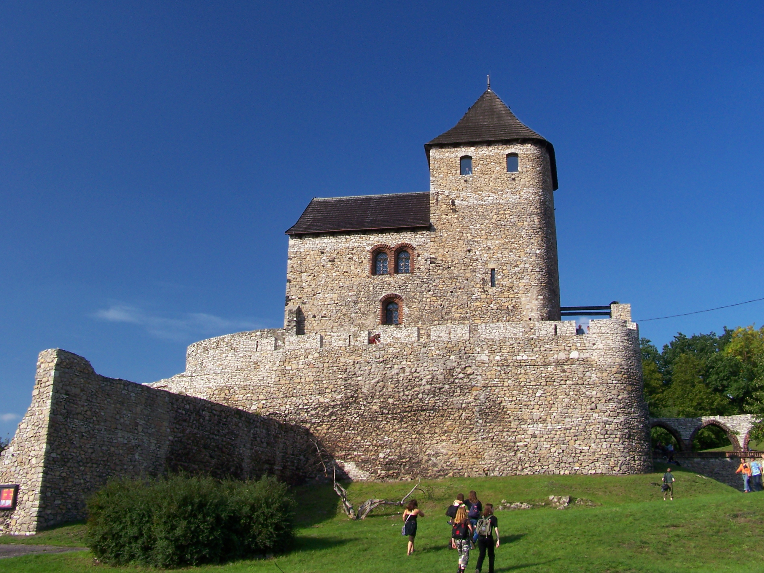 Zamek w Będzinie.